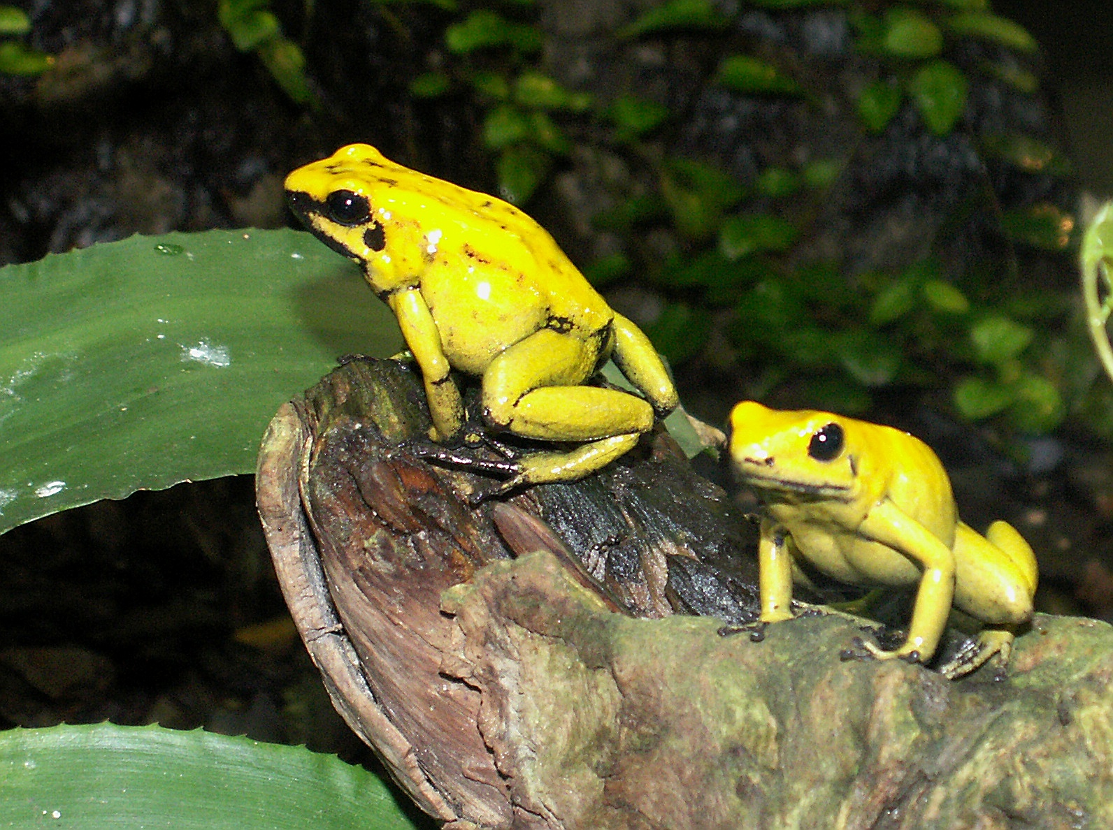 Goldener Giftfrosch (Phyllobates terribilis)